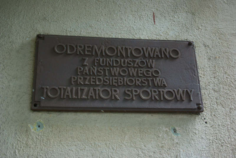 Tablica pamiątkowa na stadionie Wierchy w Sanoku, fundusz Totalizatora